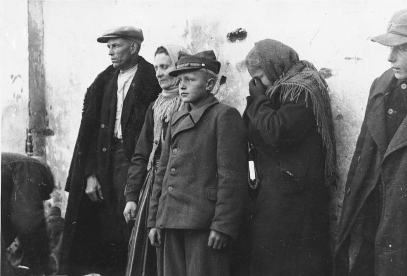 Ausgesiedelte polnische Familie Ausgesiedelte Polenfamilie (Matschak) aus Skaradsch. Fotograf: Holtfreter